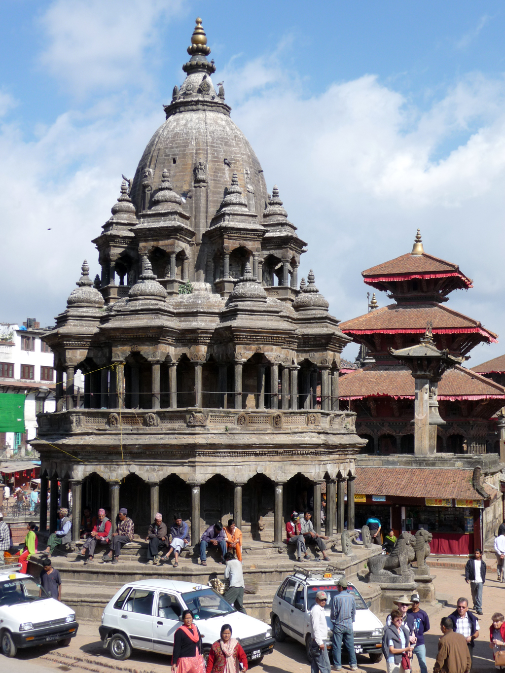 Patan, Nepal (Kathmandu Valley)